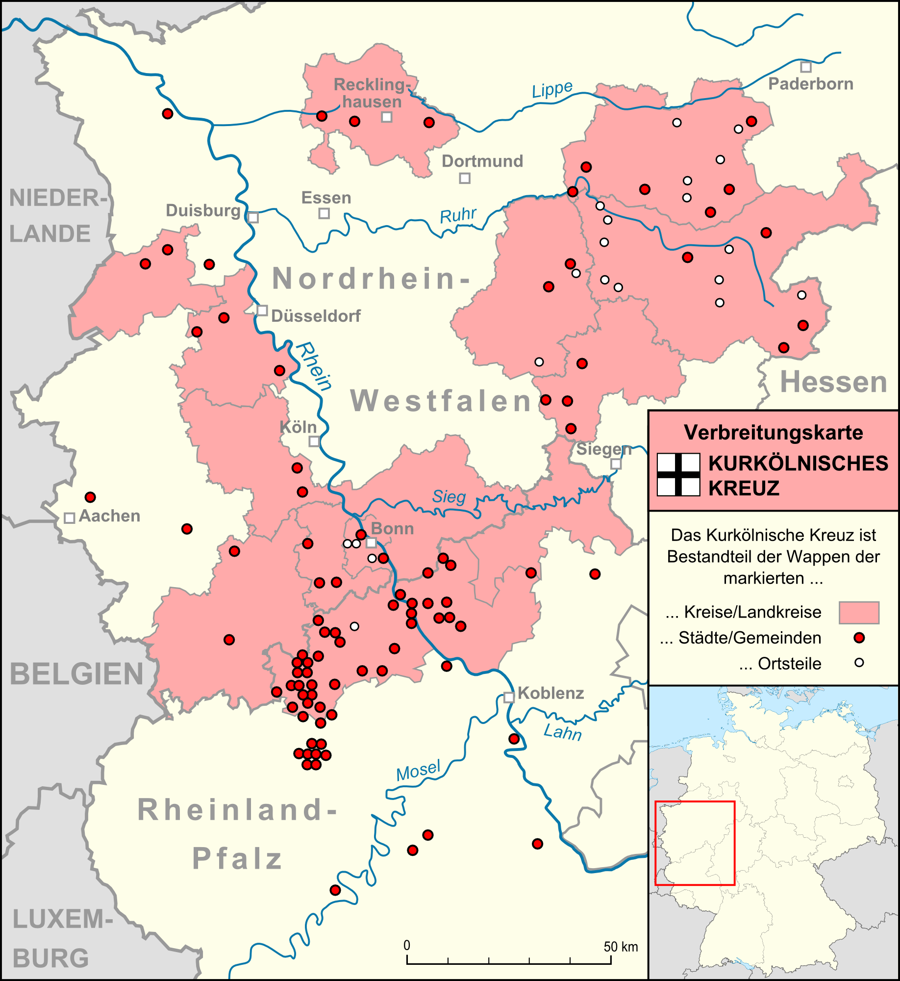 Kreise/Landkreise, Städte/Gemeinden und Ortsteile mit dem Kurkölnischen Kreuz im Wappen